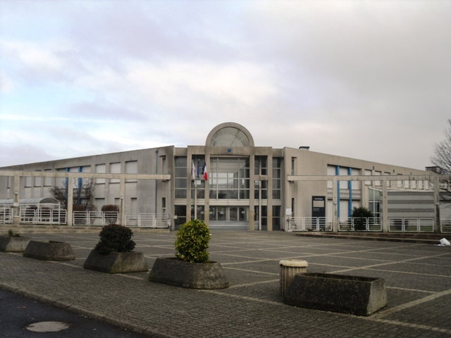 Le lycée Marguerite Yourcenar de Morangis (91)